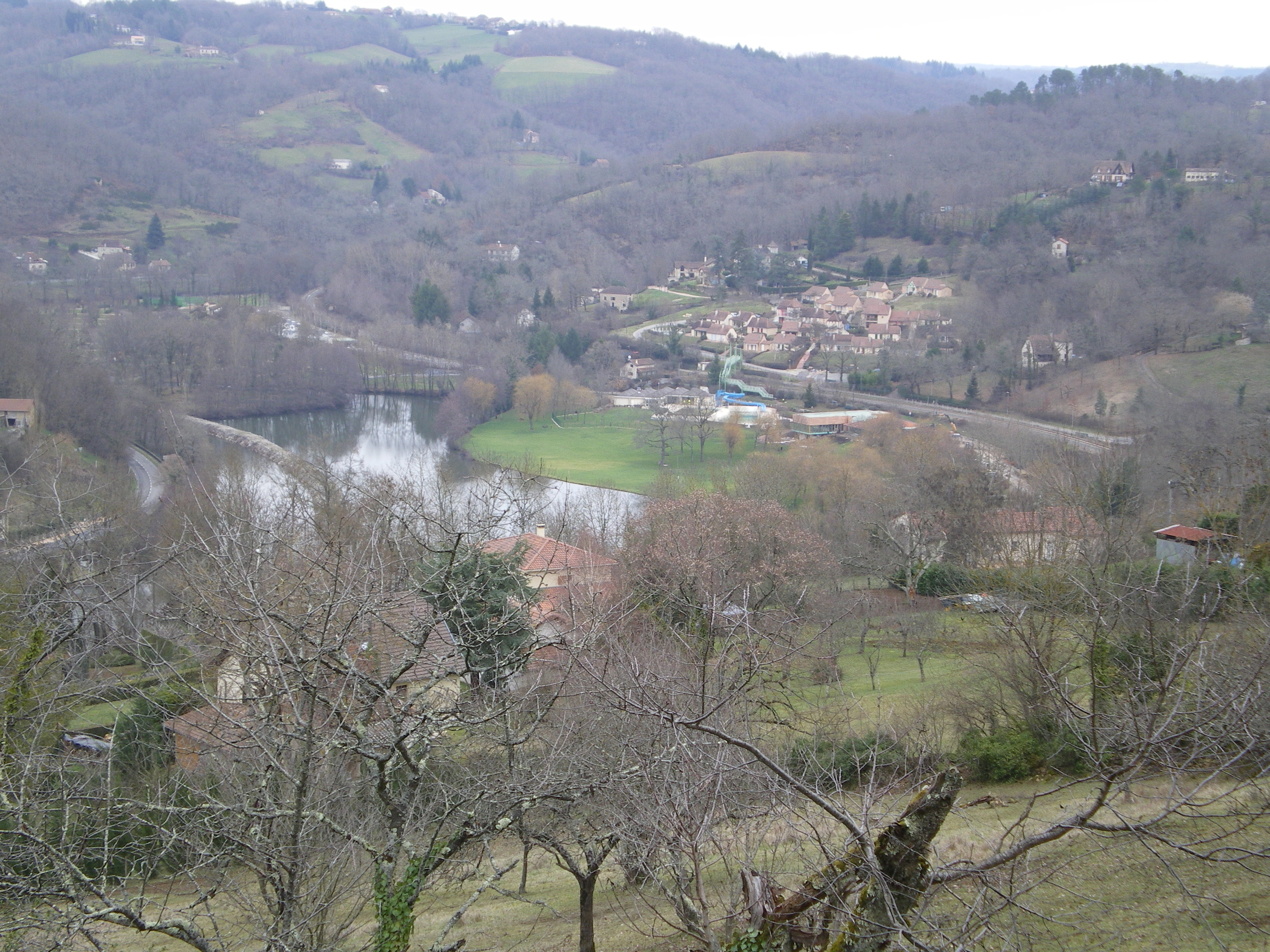 Base nautique du Surgié, Figeac, Lot, France